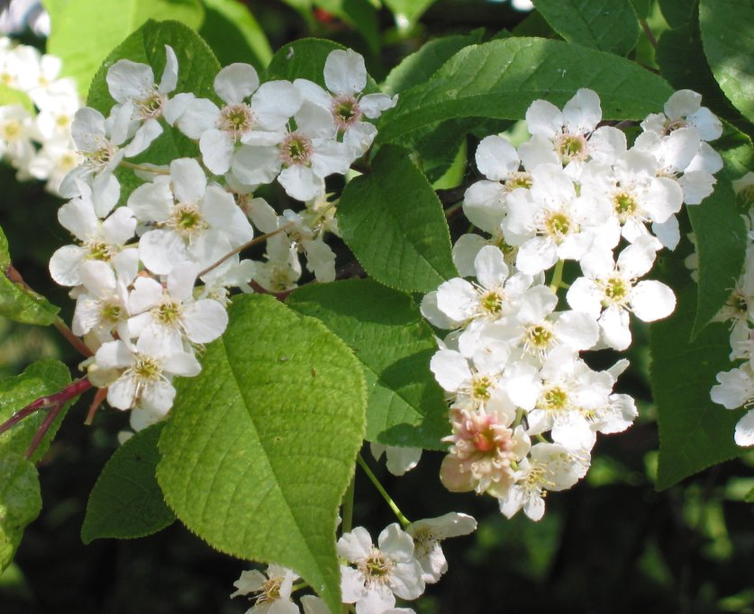 Prunus padus (Vogelkers)